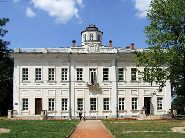 Усадьба Вяземы. Дом-дворец.